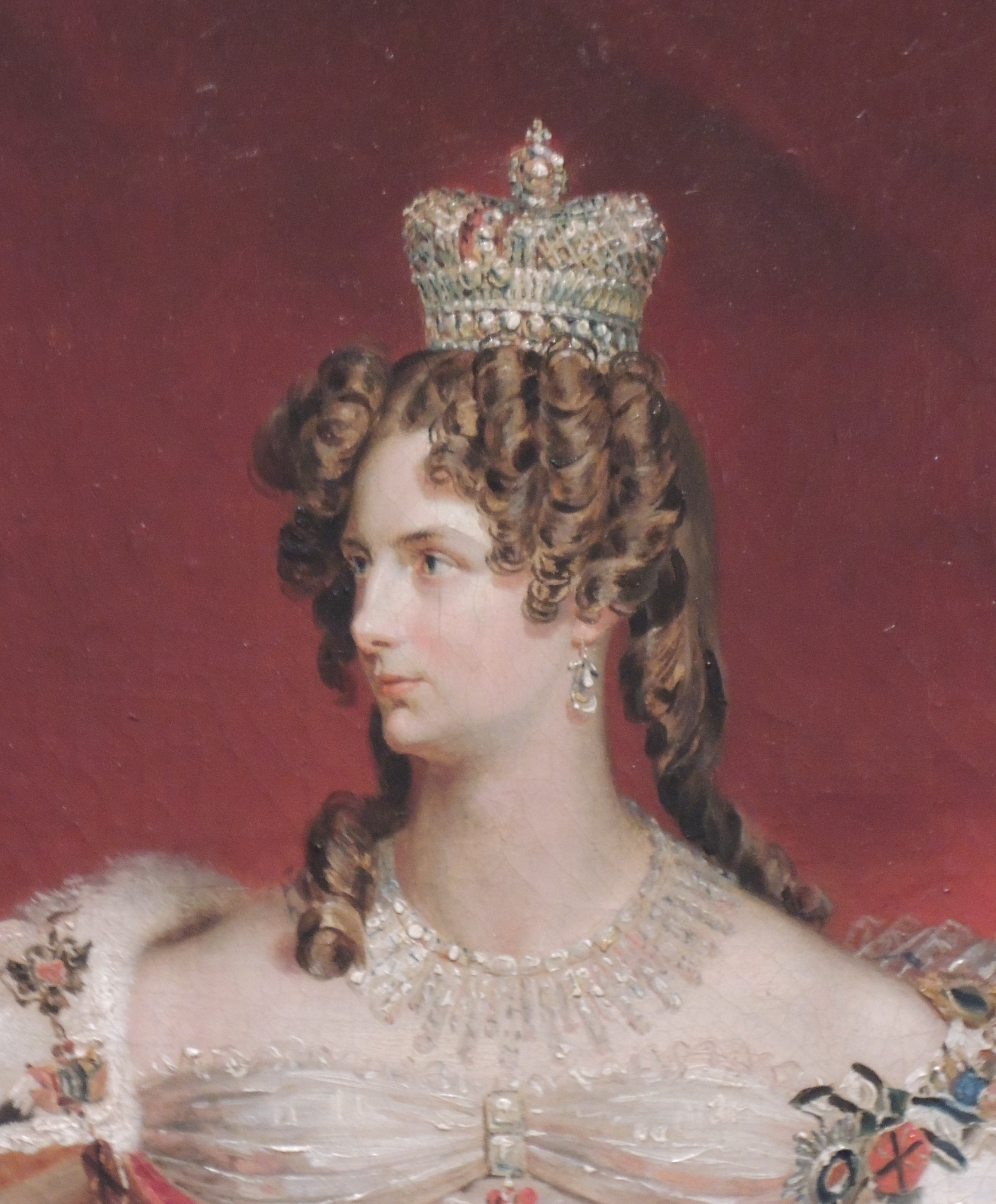 Коронационный портрет императрицы Александры Фёдоровны